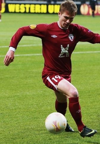 Виталий Калешин игрок ФК Рубин